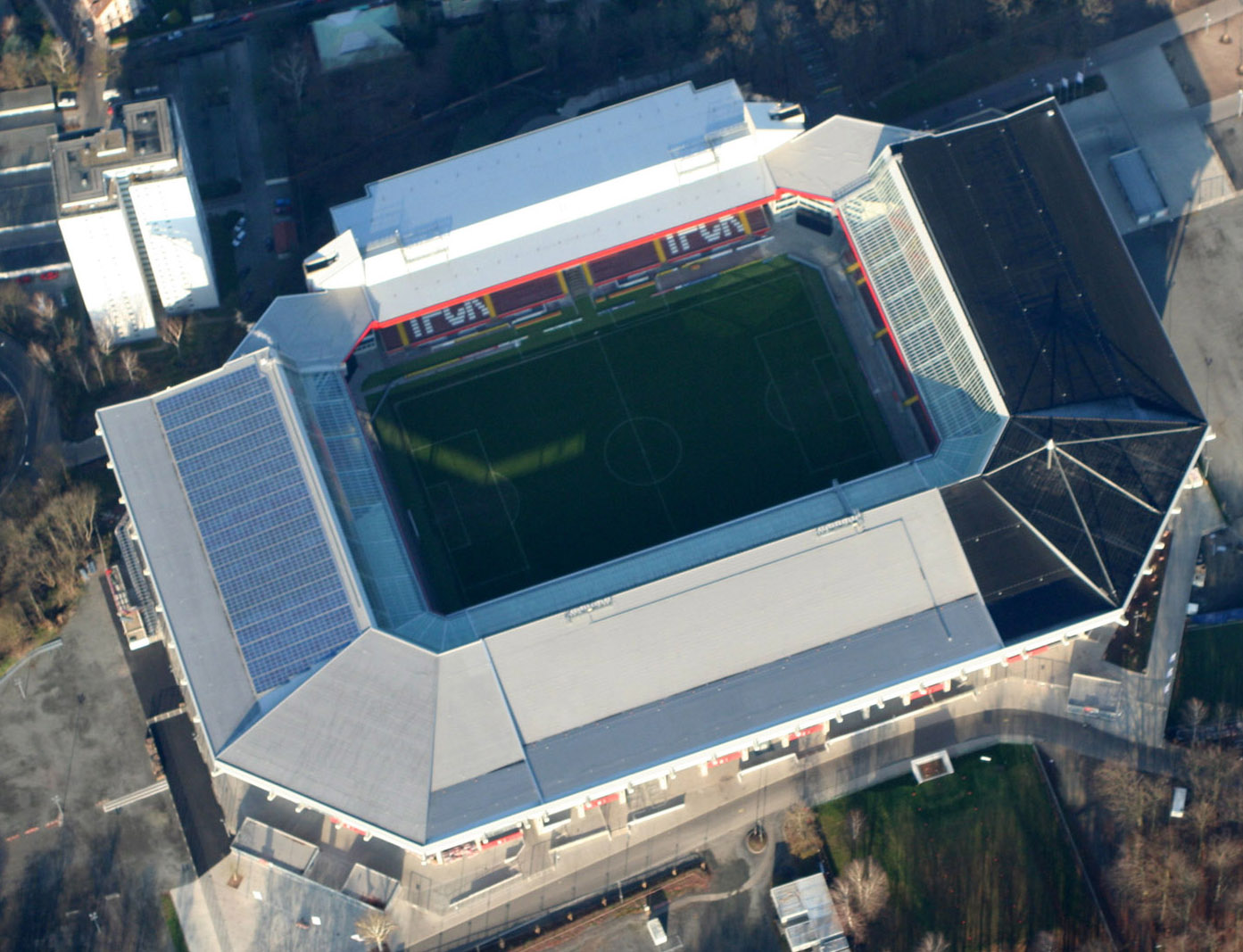 Fritz-Walter-Stadion aus der Luft